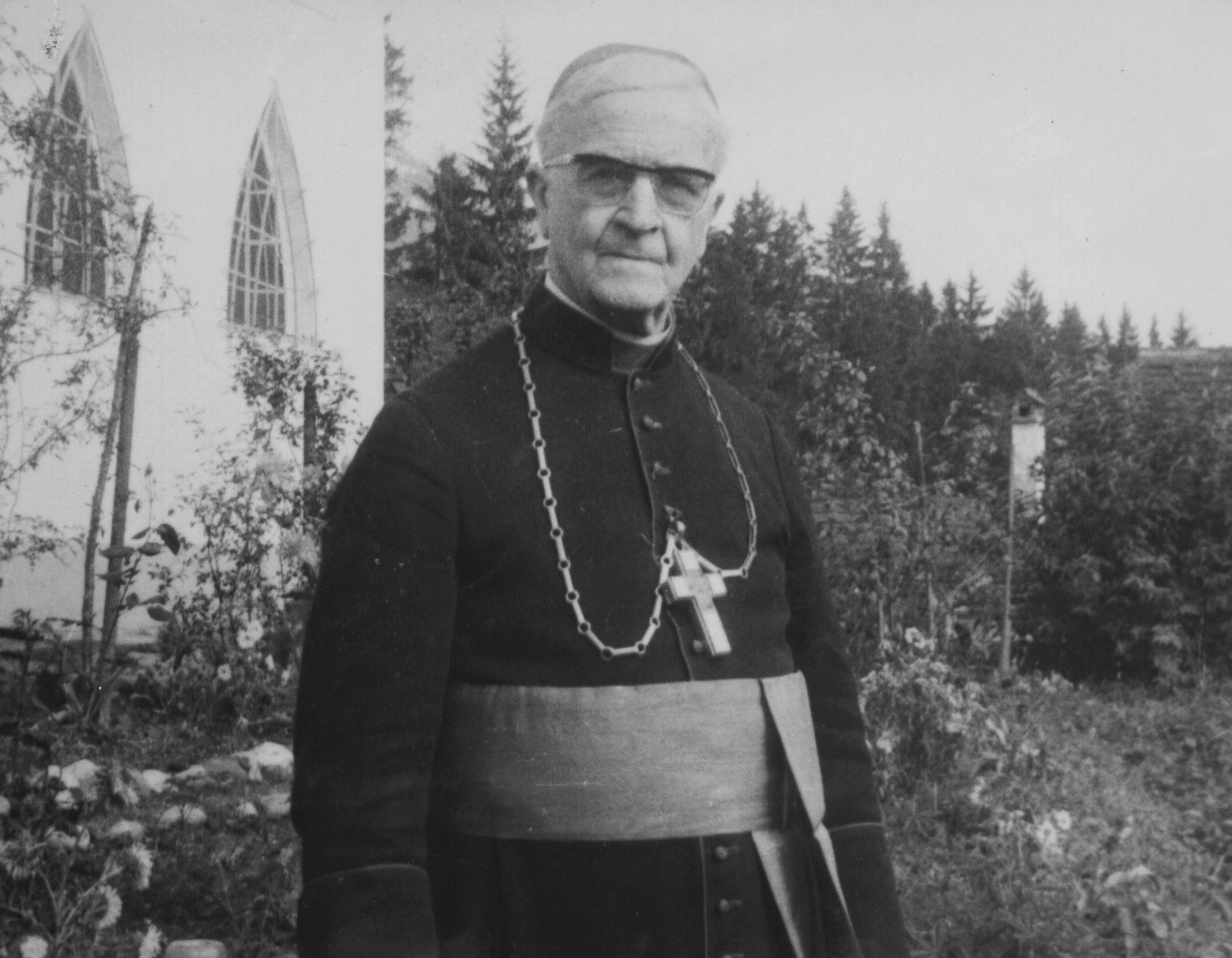 Bischof Josef Schubert, Apostolischer Administrator von Bukarest Aufnahme im Juli 1968 an seinem Zwangsaufenthaltsort im Kloster Timisul de Sus